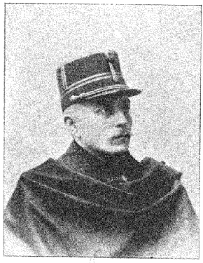 Charles Lemaire, esploristo de centra Afriko